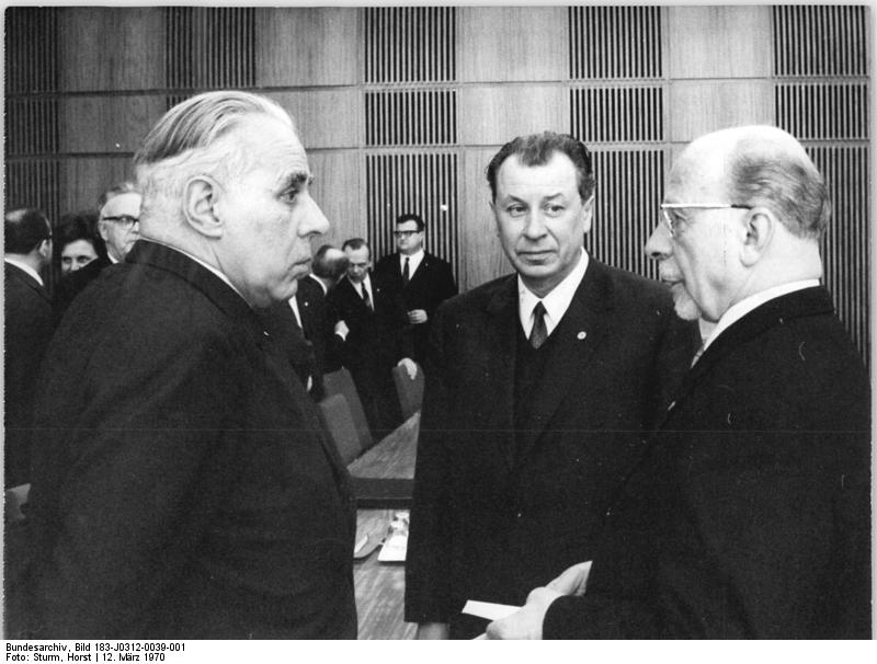 Zentralbild Sturm 12.3.1970 Berlin: 22. Sitzung des Staatsrates. In einer Beratungspause führte der Vorsitzende des Staatsrates der DDR, Walter Ulbricht, (r.) einen Gedankenaustausch mit dem Präsidenten der kammer der Technik, Prof. Dr. Ing. Horst Peschel (l.), und dem Leiter der Abteilung Forschung und Wissenschaft des ZK der SED, Hermann Pöschel (m.).